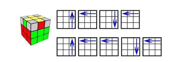 مشکل